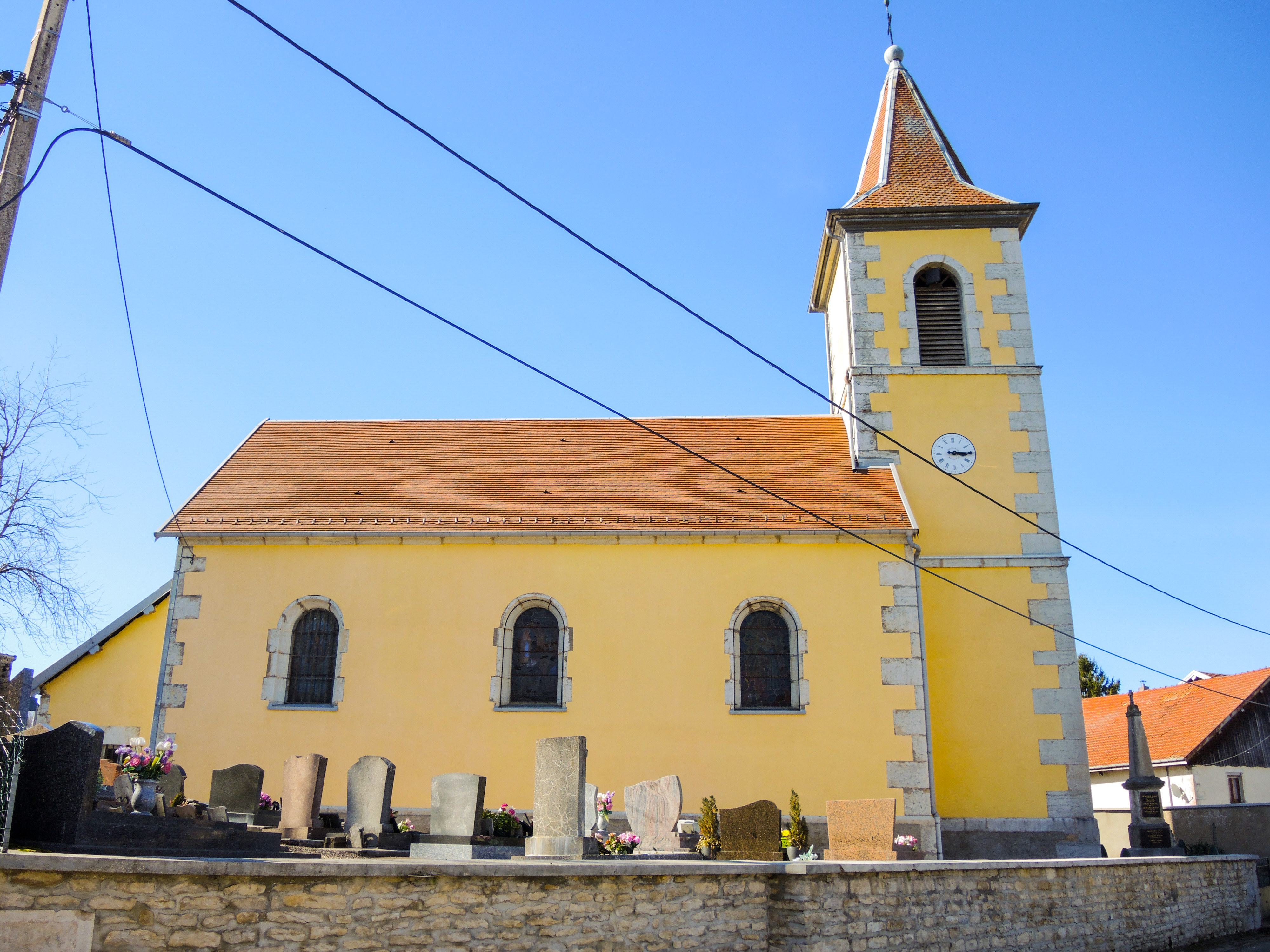 Eglise Saint Grat. Belmont.Doubs